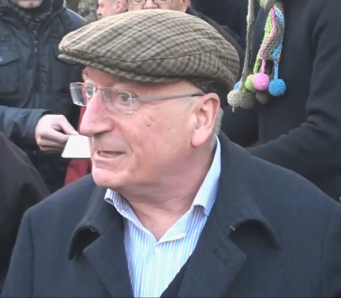 Jože Pirjevec, slovenski zgodovinar